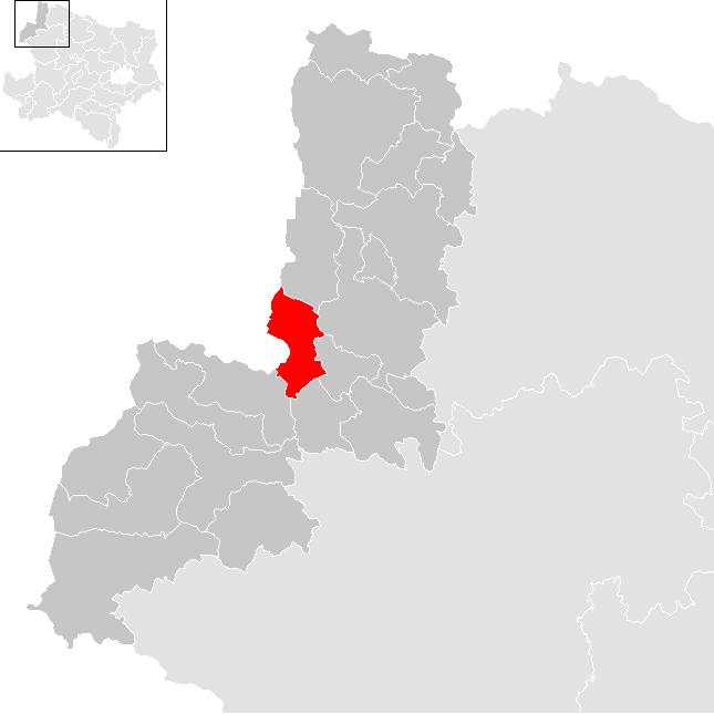 Bezirk Gmünd